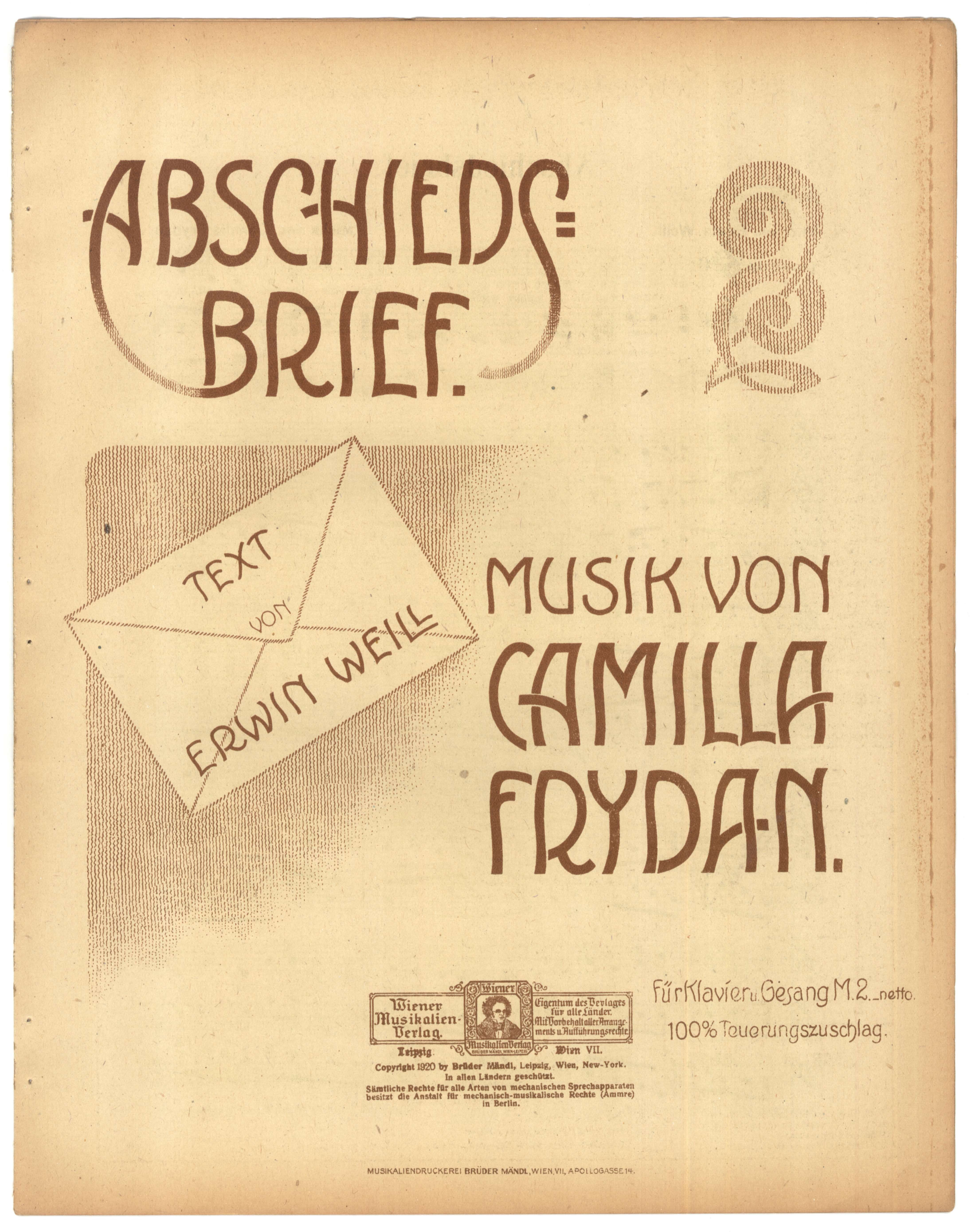 Notentitelblatt: Camilla Frydan: Abschiedsbrief, Notentitel; Text: Erwin Weill